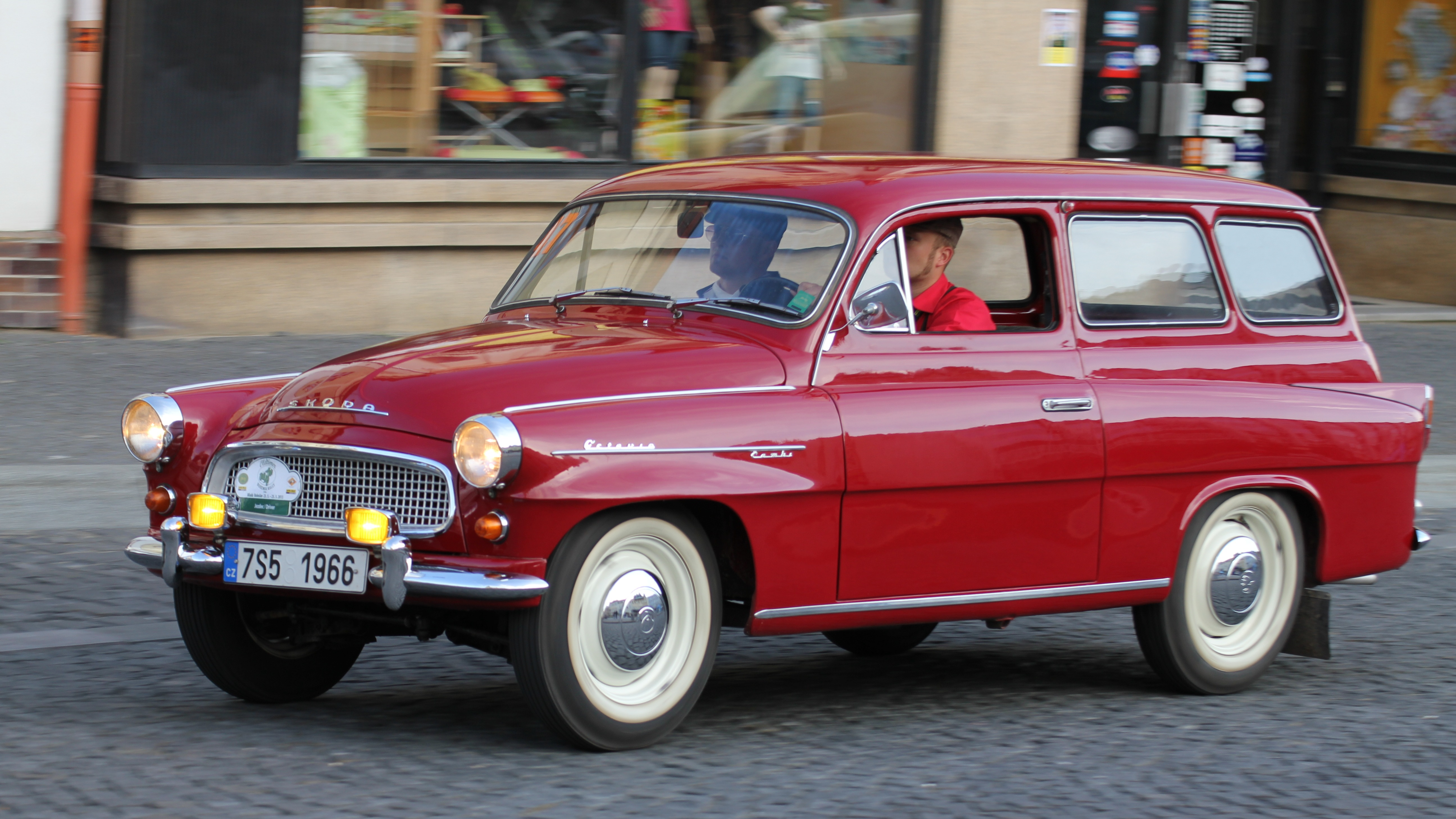 Škoda Octavia Combi 993 C (1966), 2013 Oldtimer Bohemia Rally